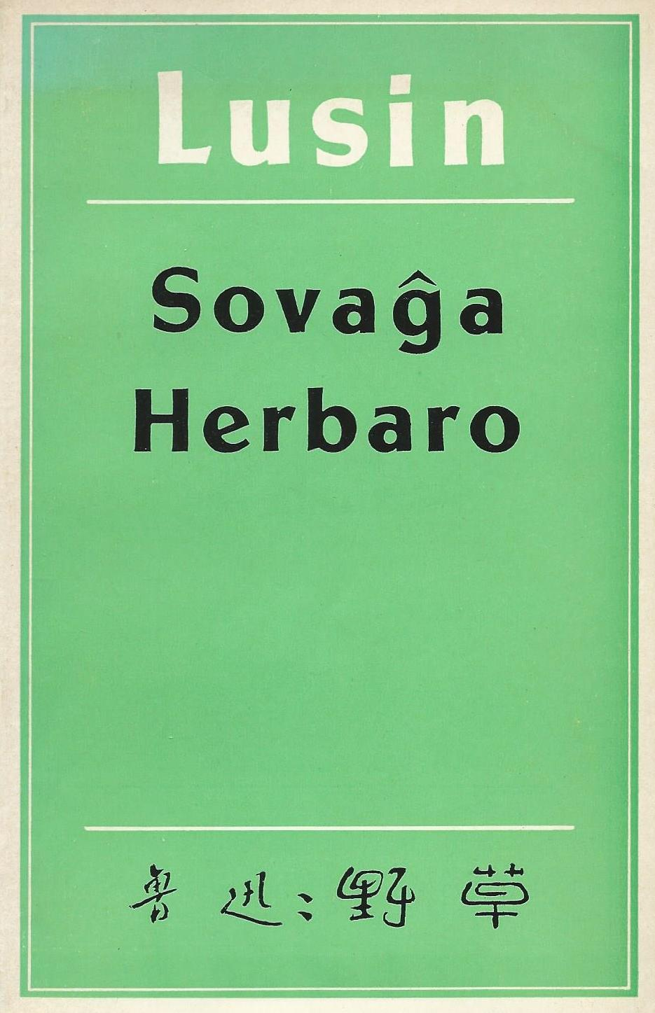 librokovrilo de "Sovaĝa Herbaro", 1974